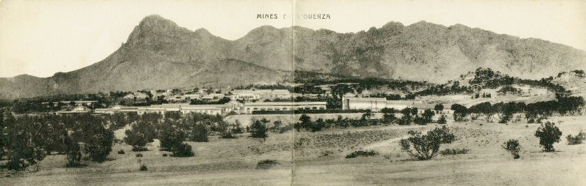 mines de ouenza